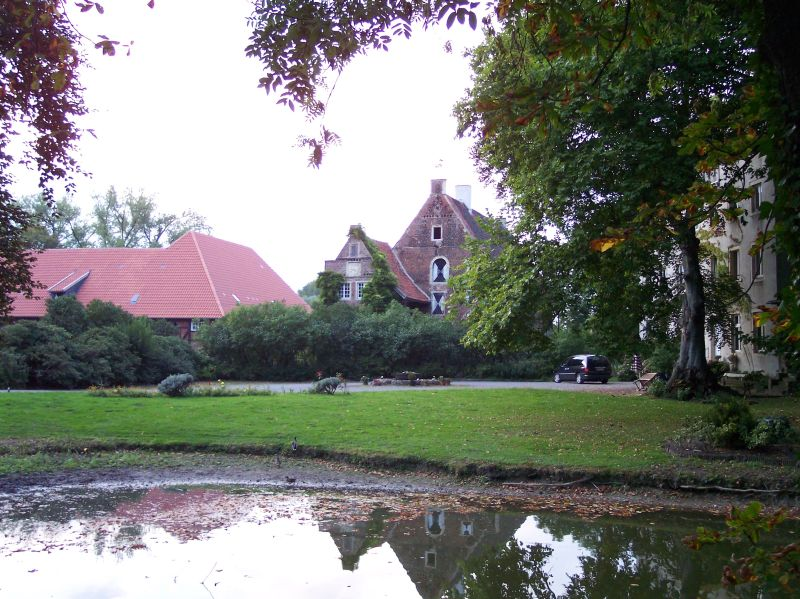 Haus Ermeling, eigenes Bild